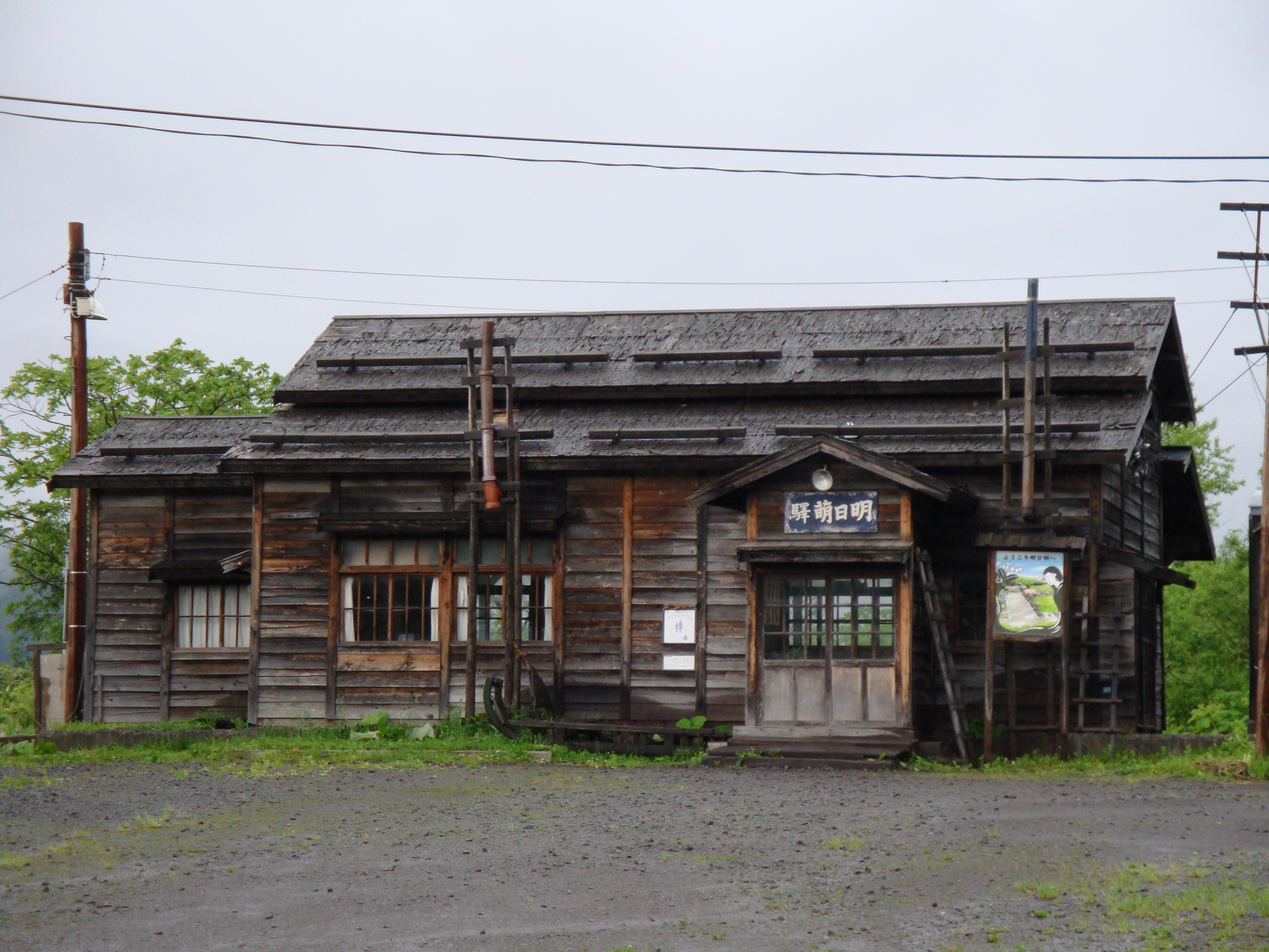 明日萌驛全景（2009年6月14日撮影）